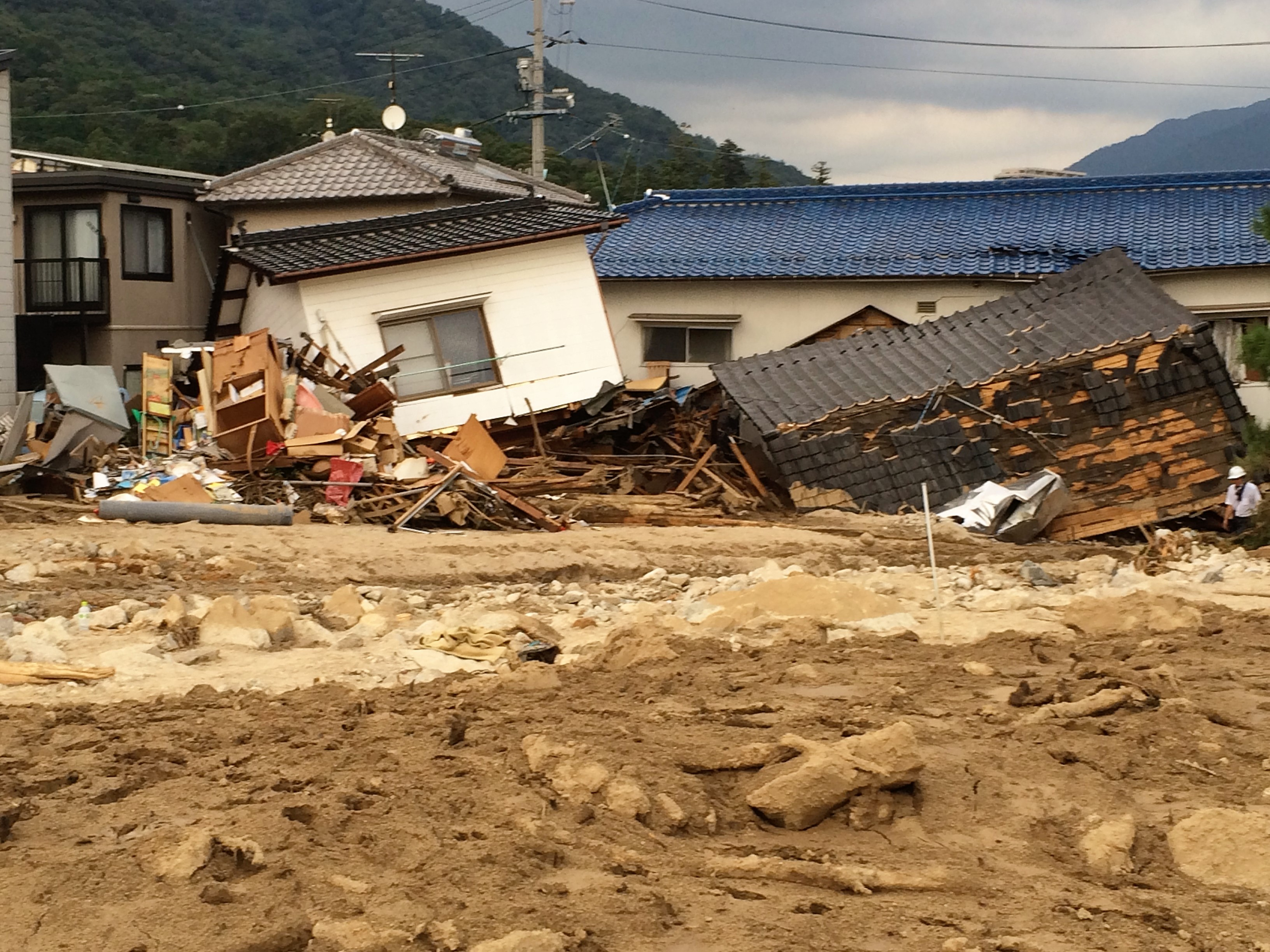 2014年8月20日の広島県豪雨災害。流された家屋。